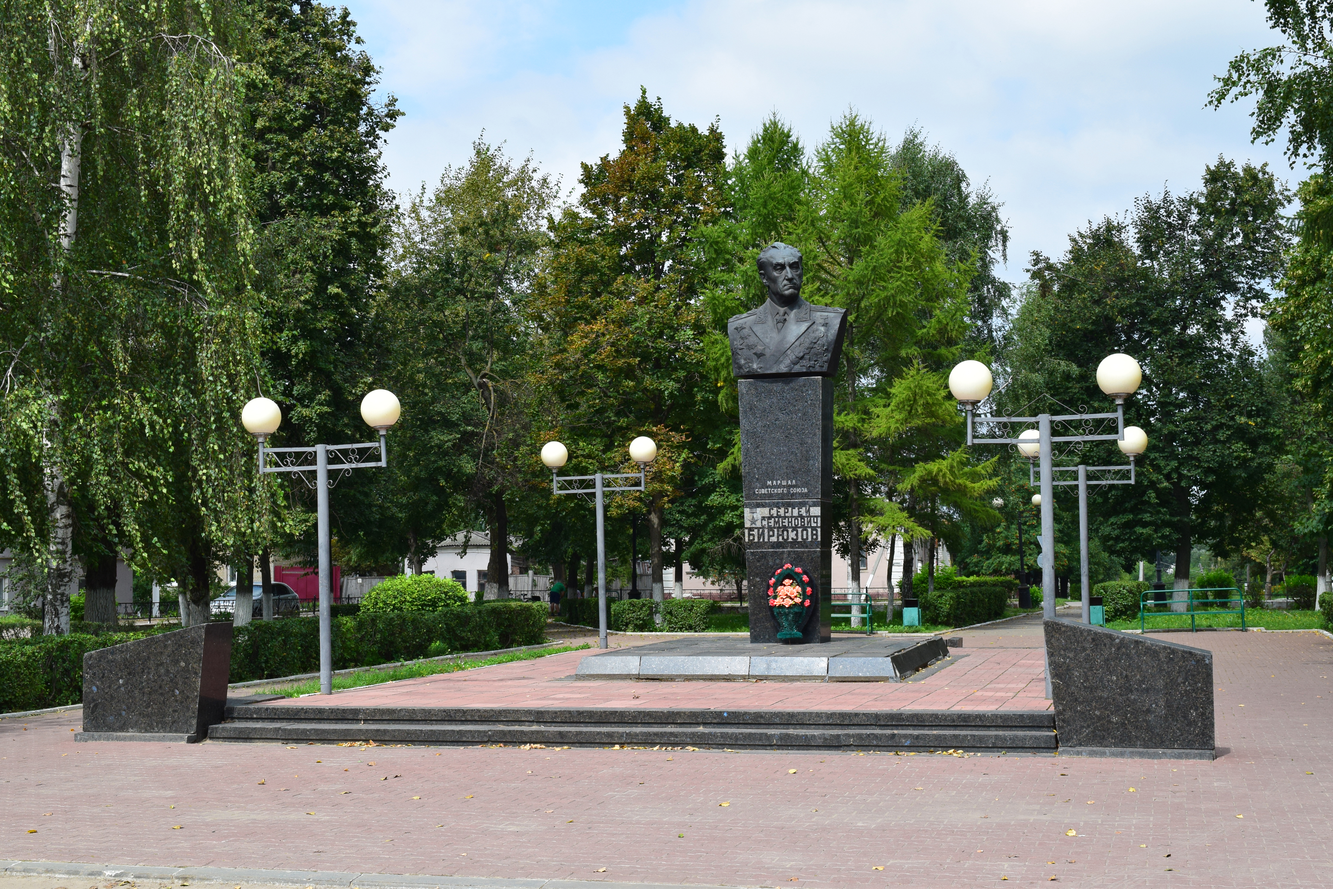 Памятник Маршалу Советского Союза Сергею Бирюзову, г.Скопин Рязанской области